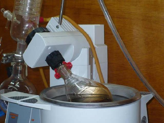 equipo de rota vapor